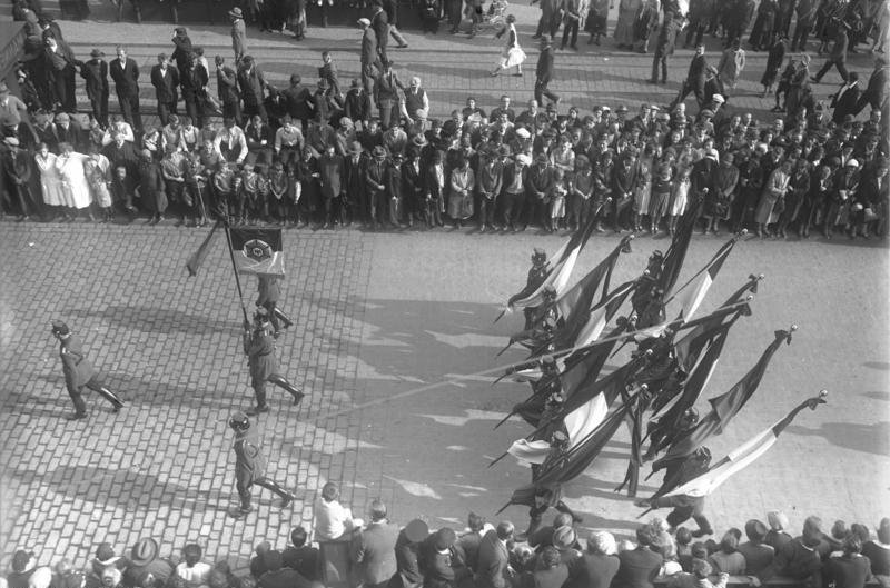 Die feierliche Beisetzung der ermordeten Schupo-Offiziere in Berlin! Die Fahnen-Kompagnie mit der Standarte der Schutzpolizei an der Spitze im feierlichen Trauerzug der Schutzpolizei.